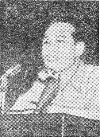 Kim Jong-pil, 1961.06.05